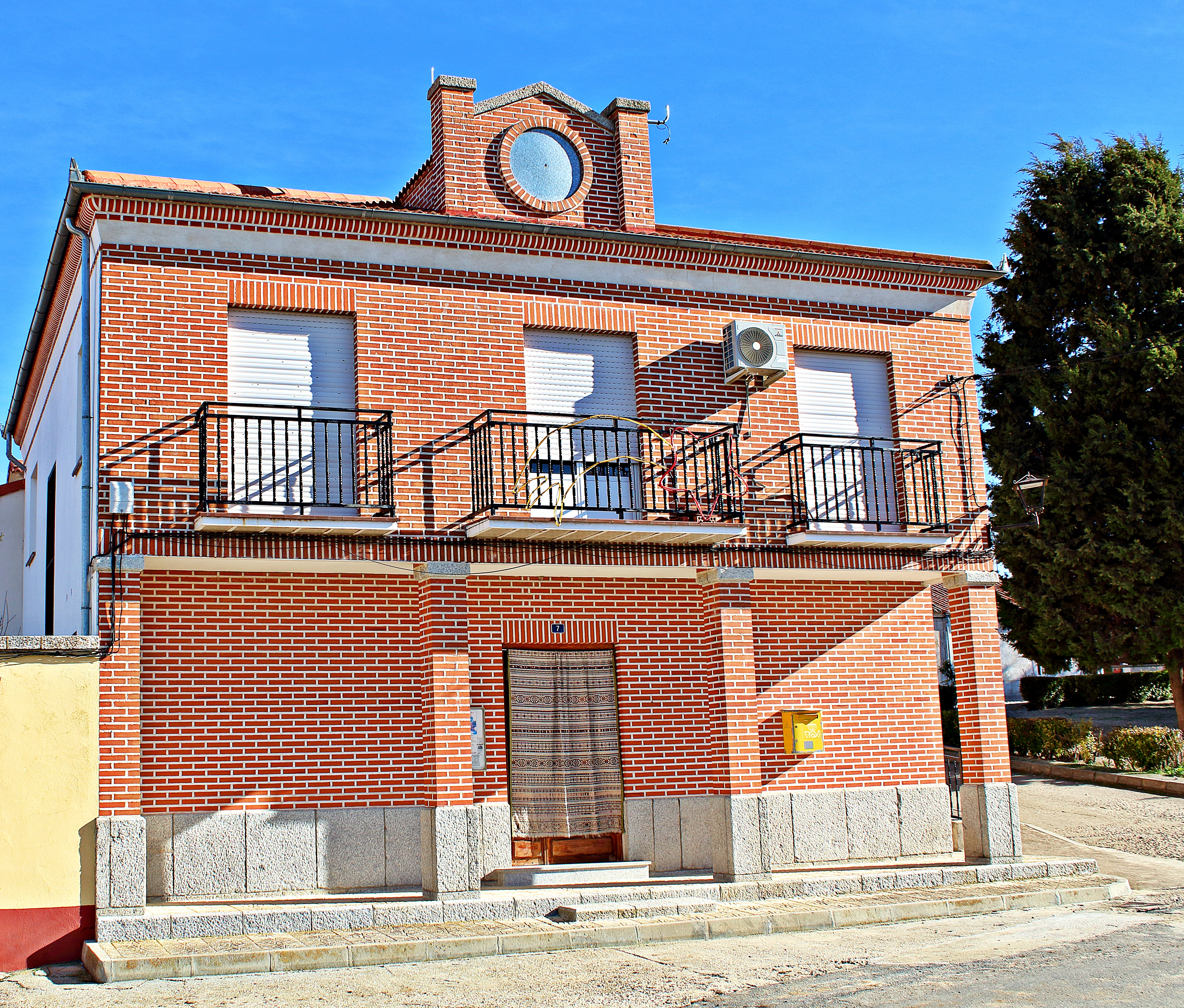 Cisla municipio de la comarca de La Moraña en la provincia de Ávila